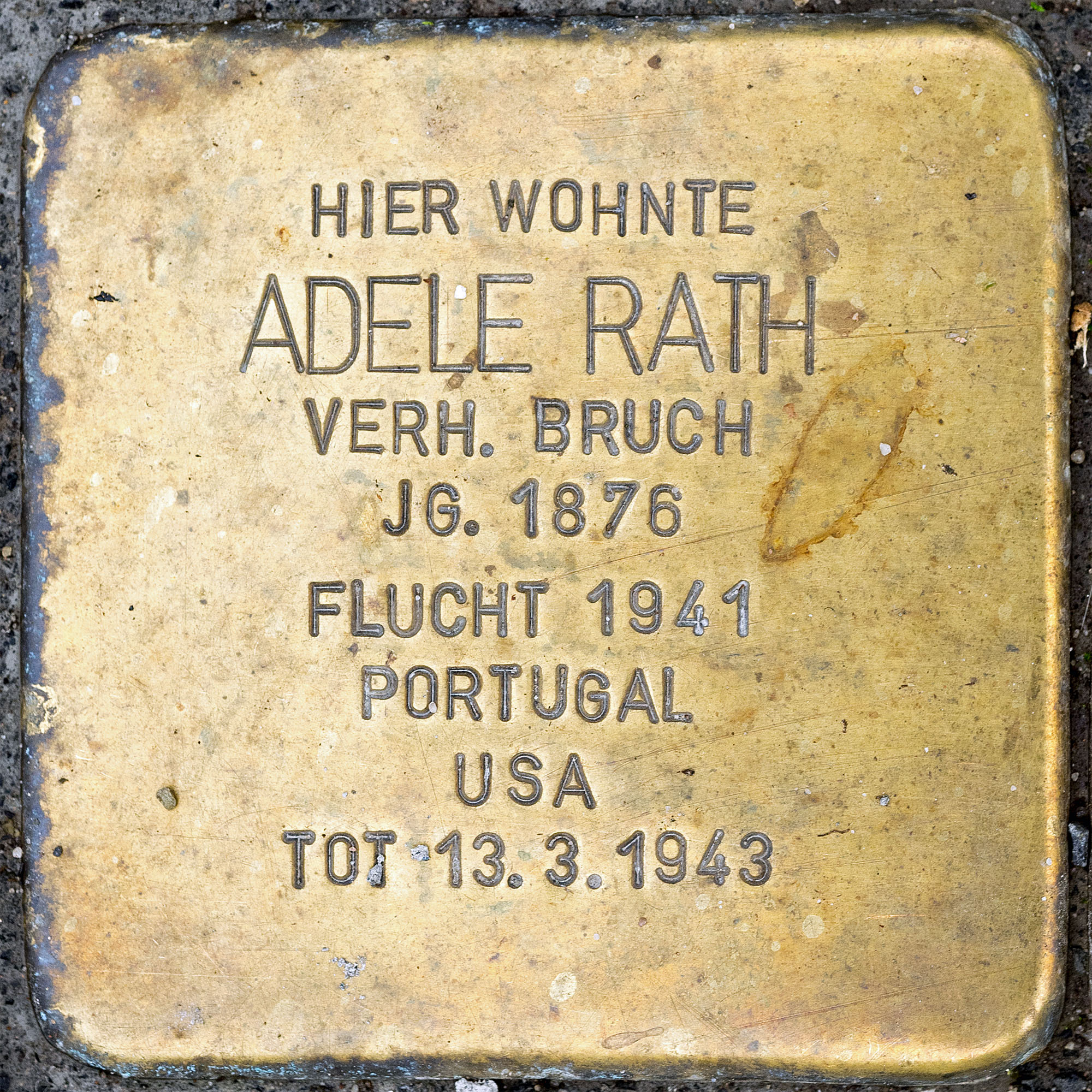 Stolpersteine Kempen: Bruch, Adele